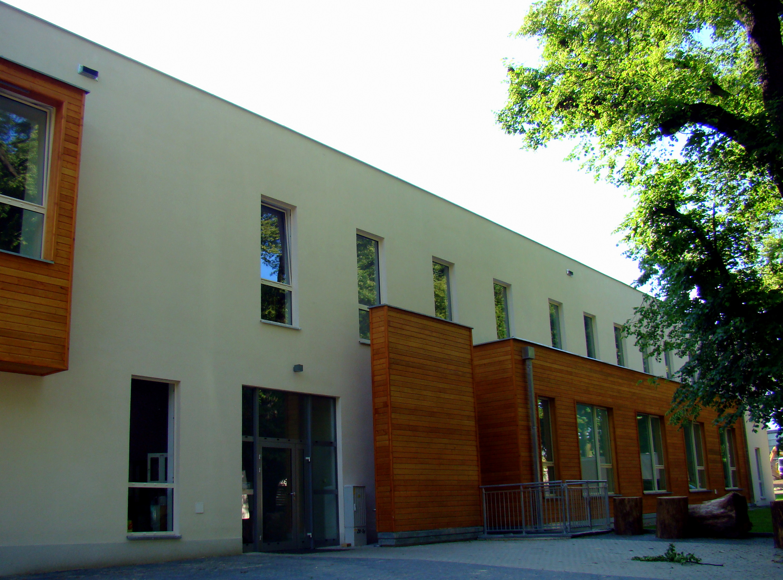 Teatr Lalek Pleciuga, Szczecin, Polska